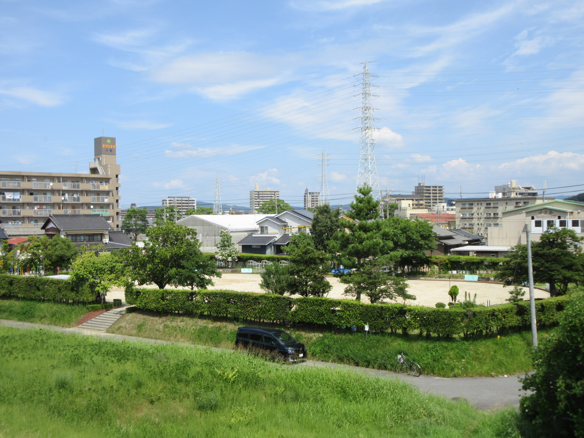 八帖公園（岡崎市八帖北町）